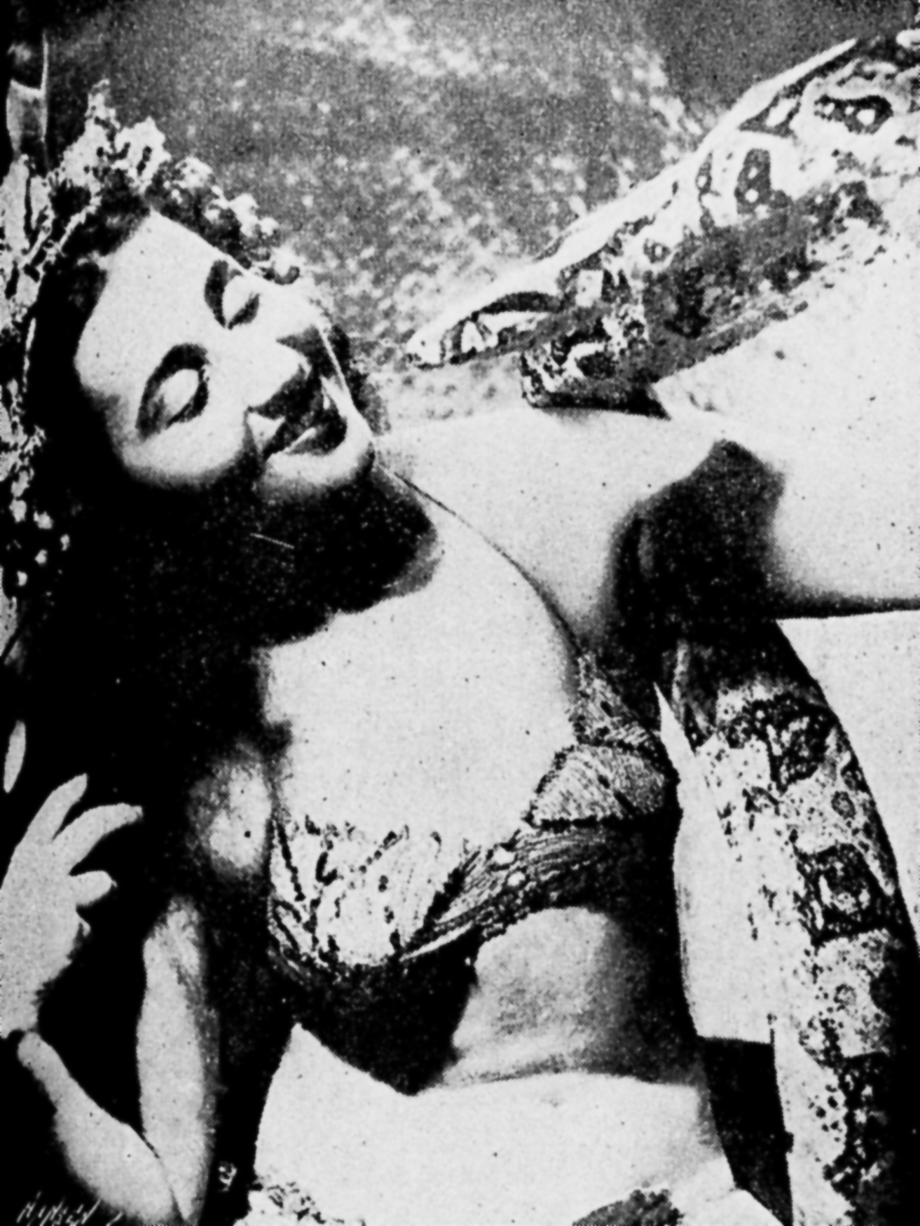 Atriz, dançarina e naturista brasileira, Luz del Fuego, em 1946.